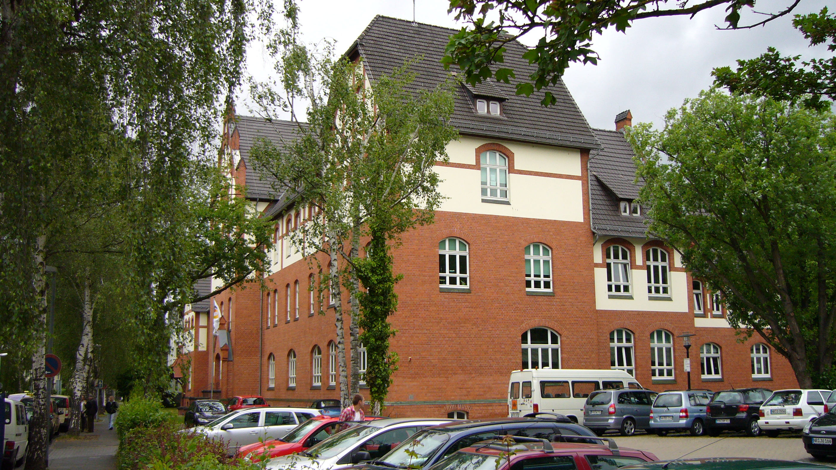 Taubstummenschule